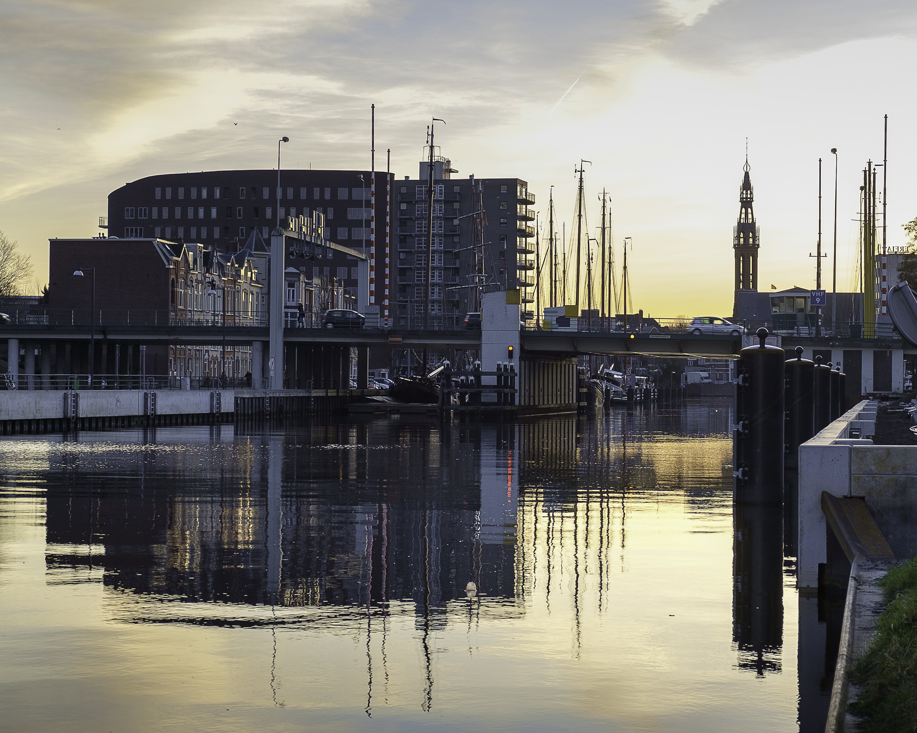 Oosterhavenbrug gezien vanaf het Eemskanaal